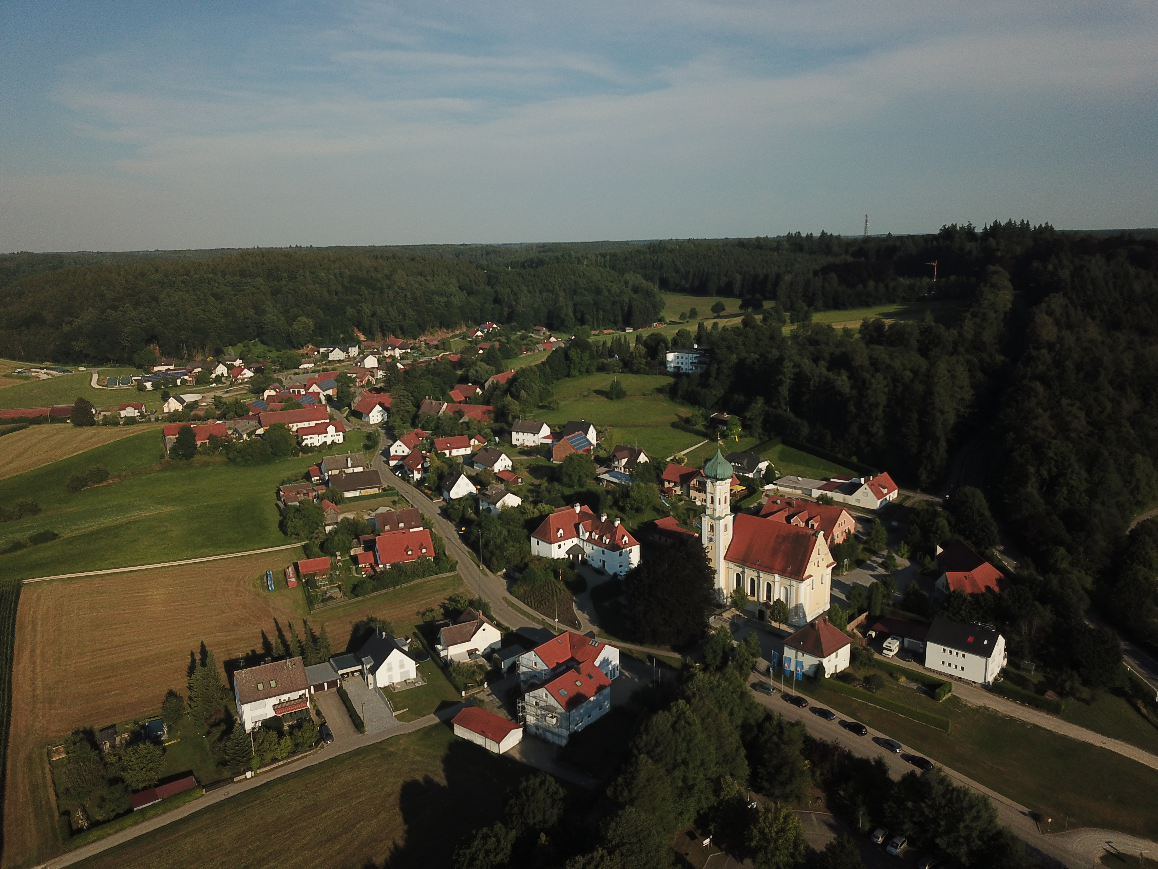 Ortsteil Maria Vesperbild mit Kirche und Nebengebäuden